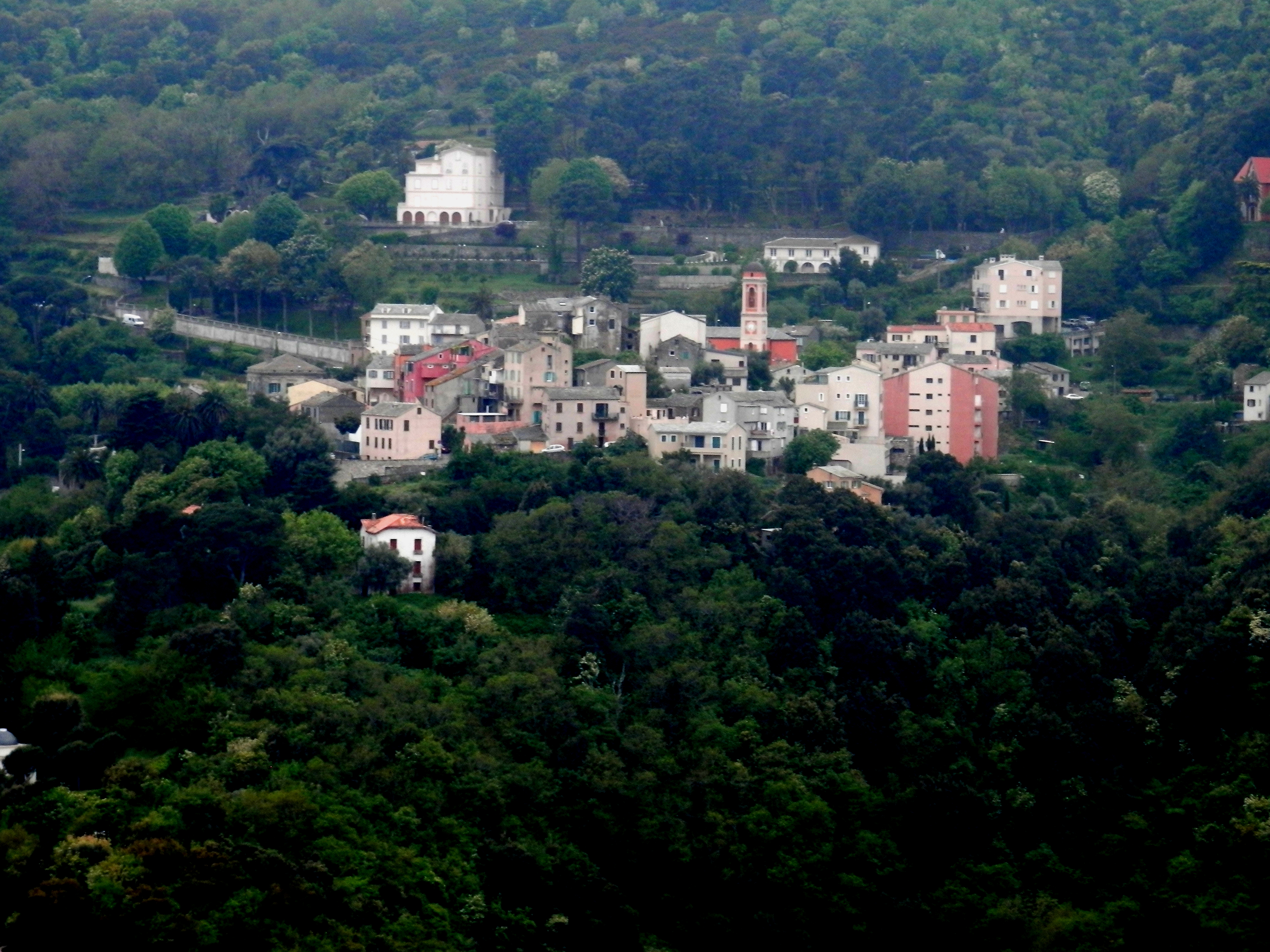 Corsu: U paese di Cardu (Cismonte)